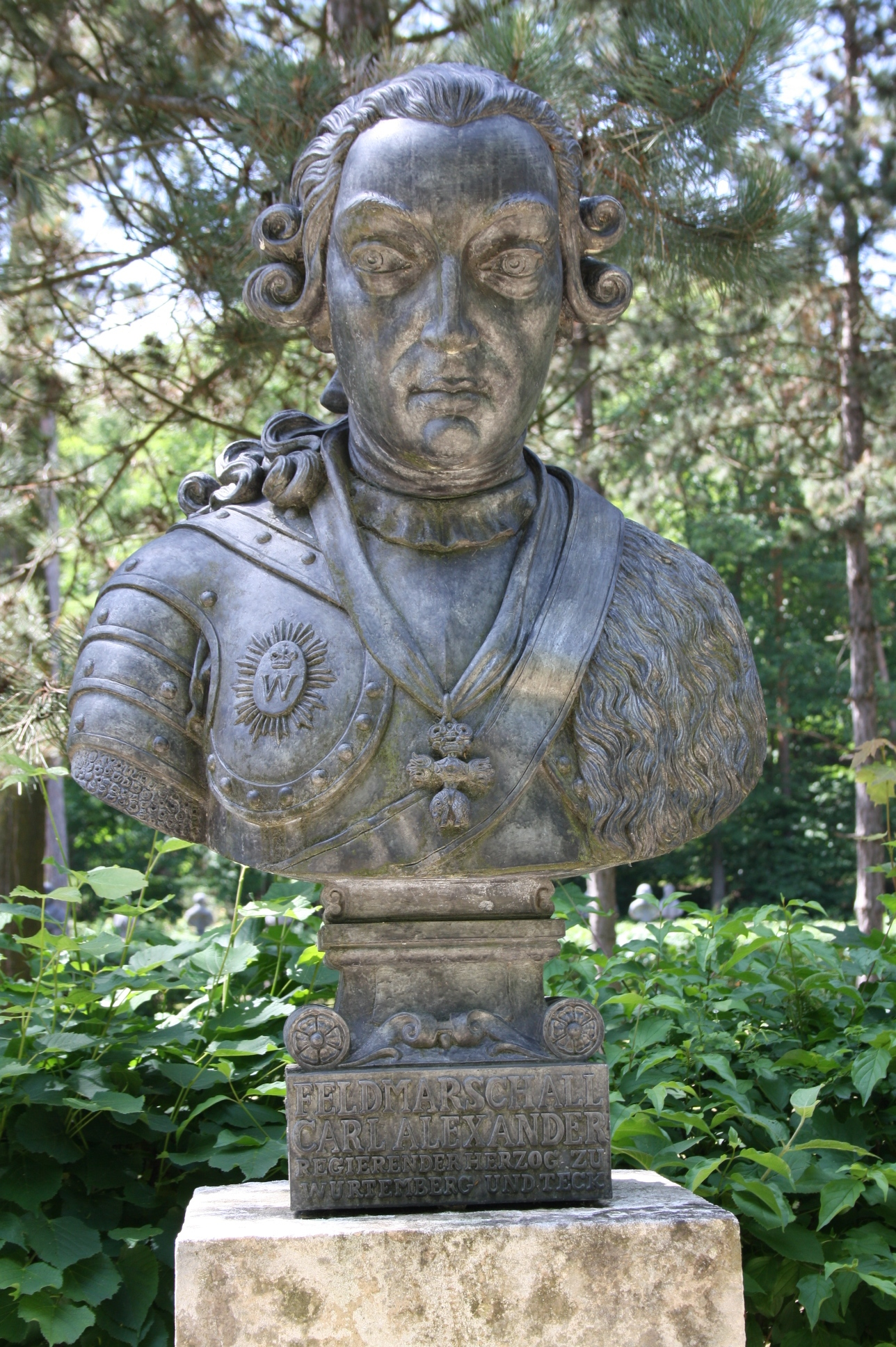 Büste in der Gedenkstätte Heldenberg (Niederösterreich)